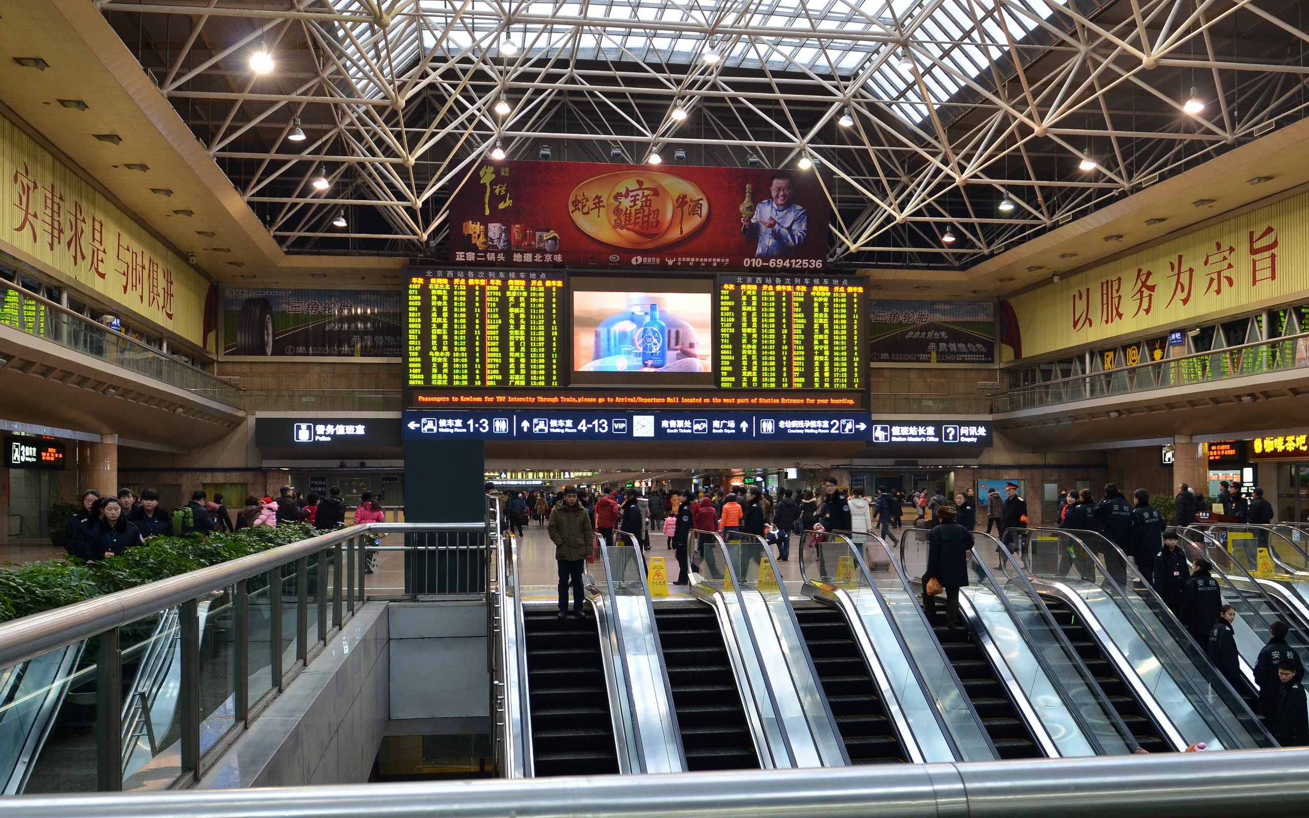 中文（中国大陆）: 北京西站进站候车大厅